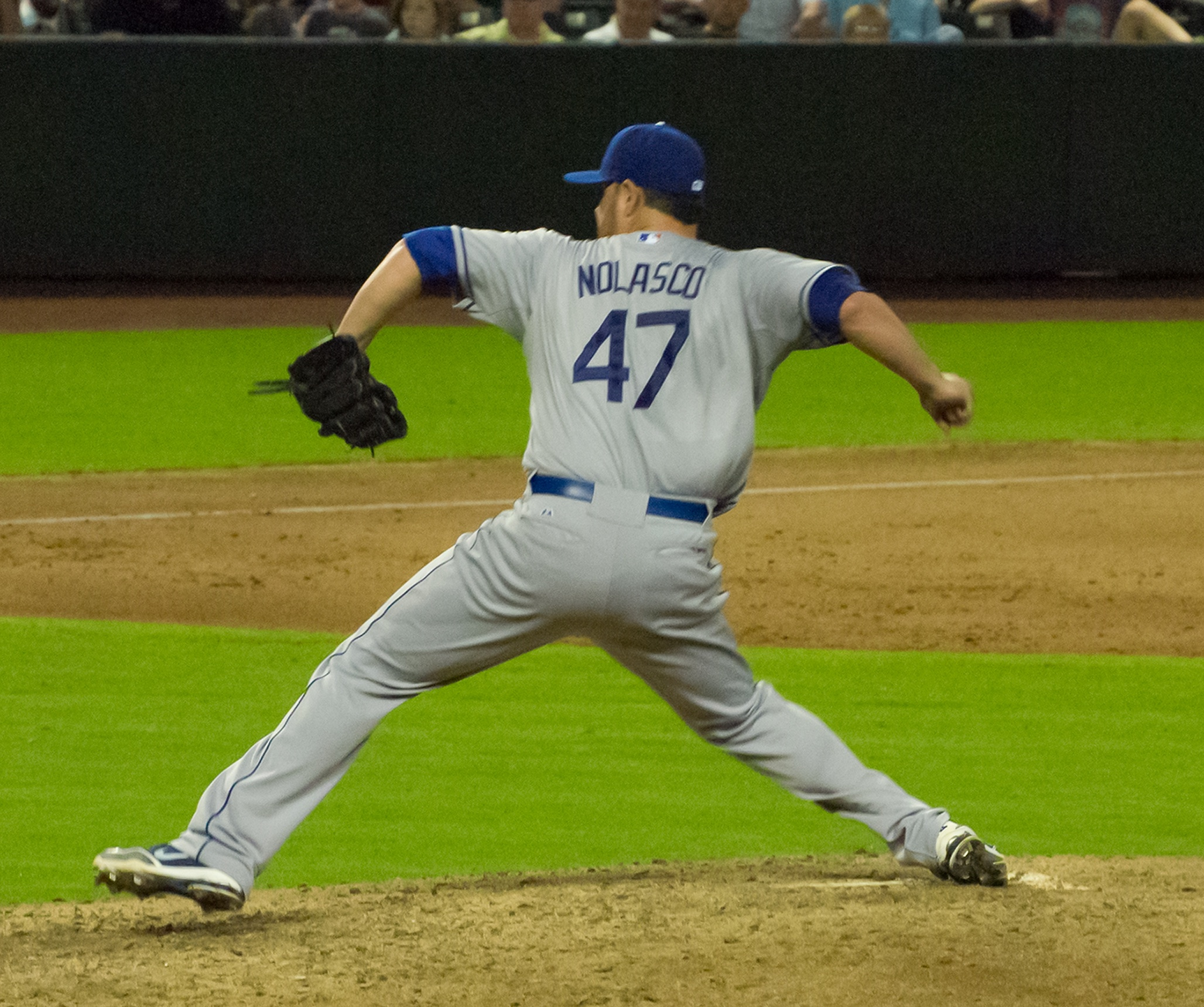 Ricky Nolasco